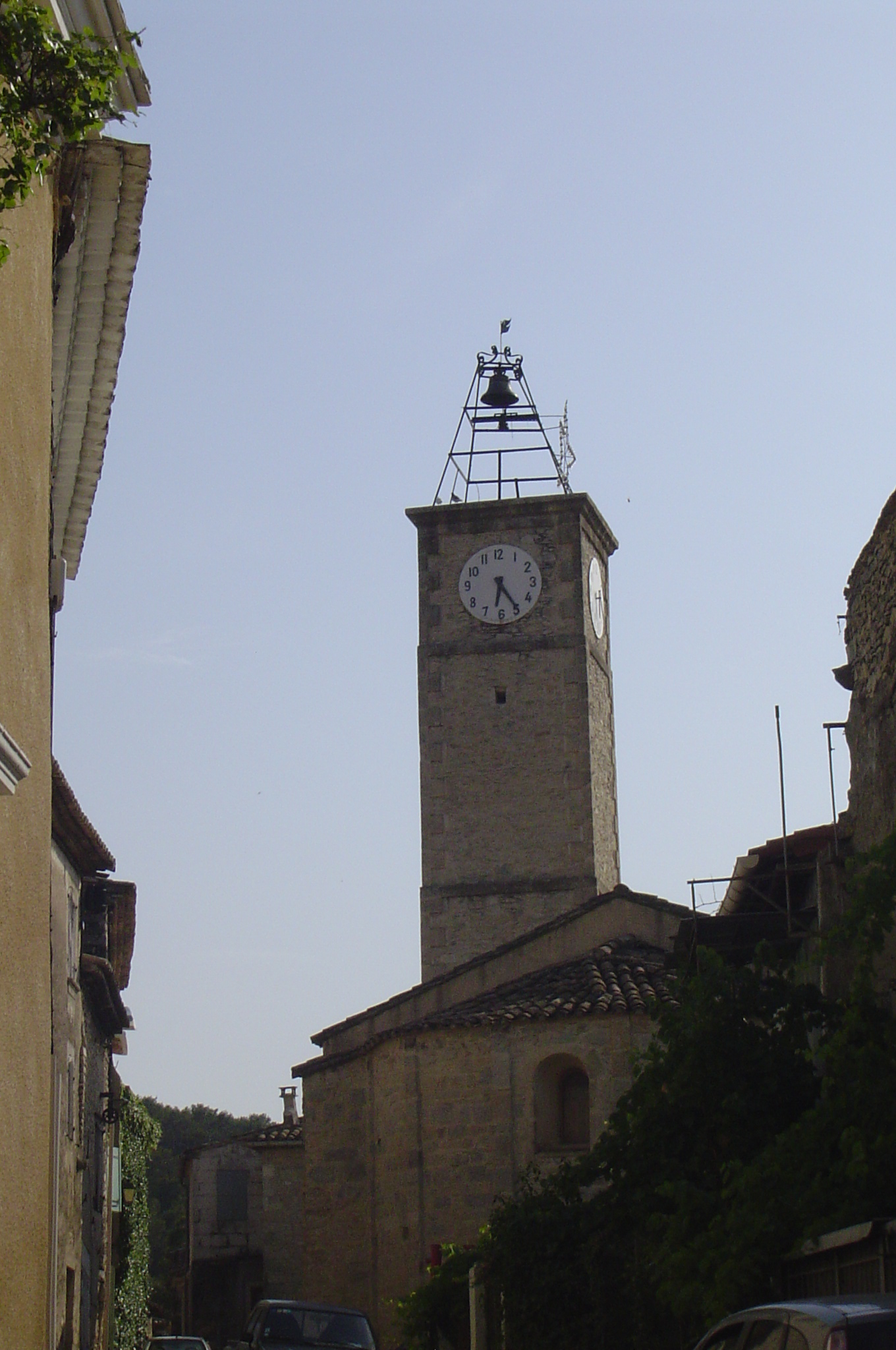 Temple de Langlade, photo personnelle de Nicolas Cadène, 14/10/2006, reproduction à l'identique autorisée sur Wikipedia